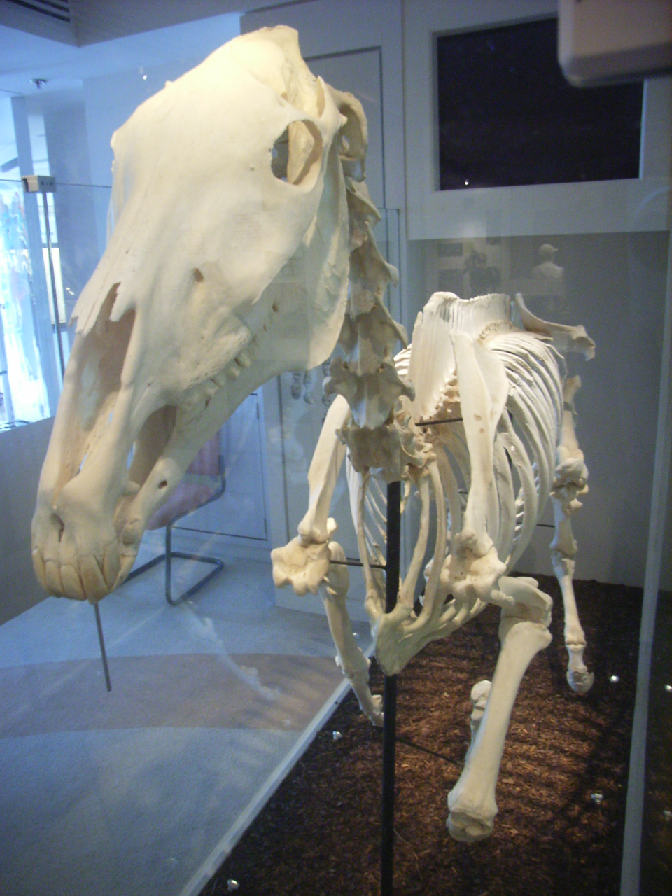 Silver Lining 祿怡馬王 Hong Kong